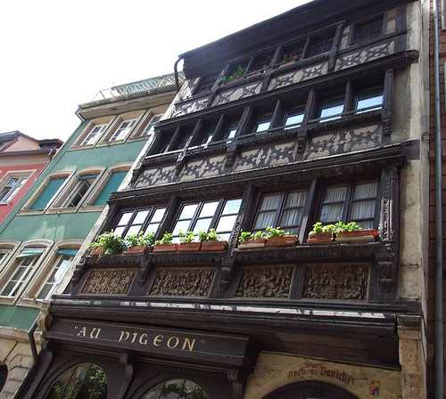 Das Restaurant "Au Pigeon" in Straßburg, während des Kaiserreichs "Zur dicken Marie" genannt.